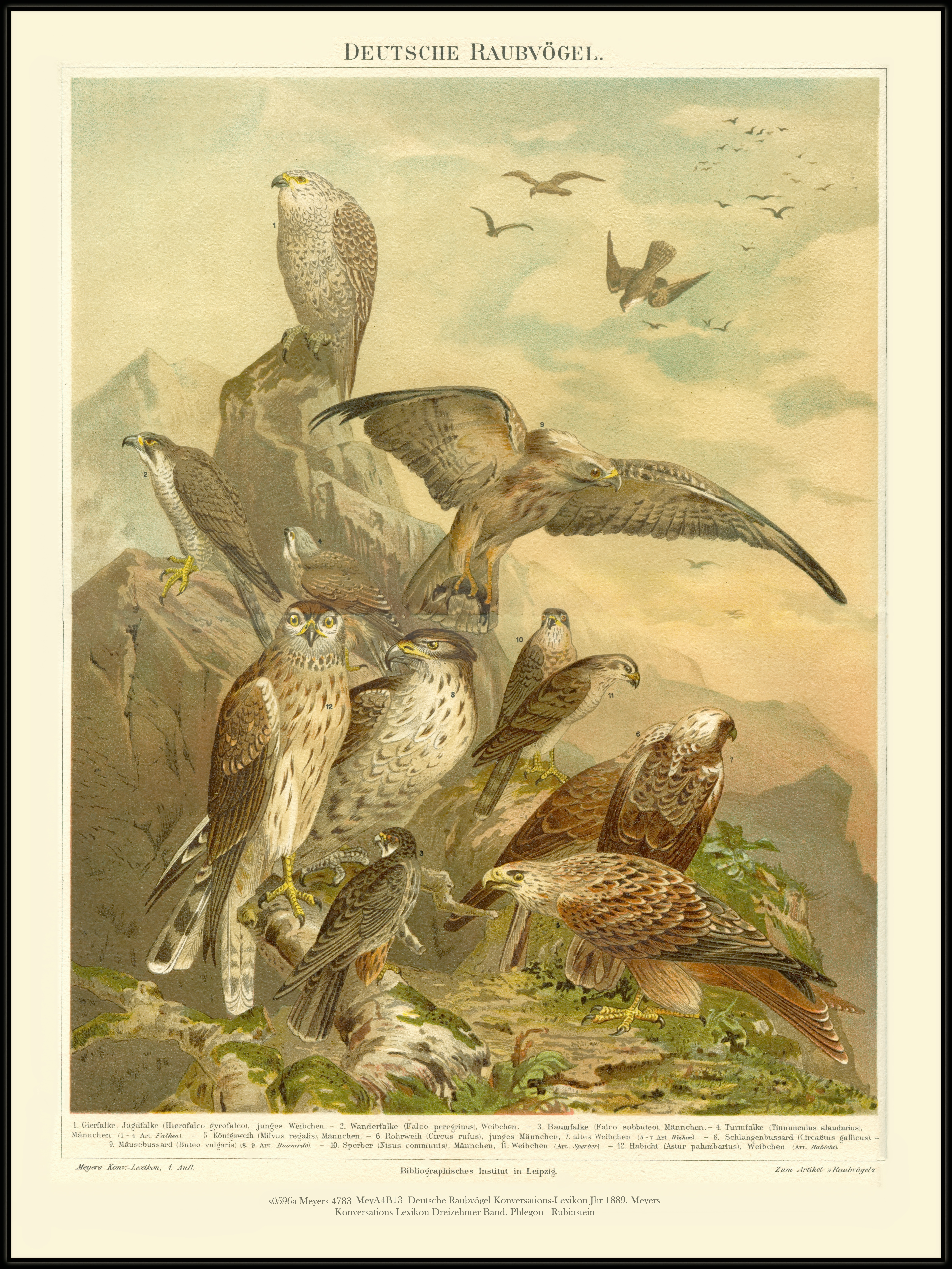 s0596a Meyers 4783 MeyA4B13 Deutsche Raubvögel Konversations-Lexikon Jhr 1889. Meyers Konversations-Lexikon Dreizehnter Band. Phlegon - Rubinstein.